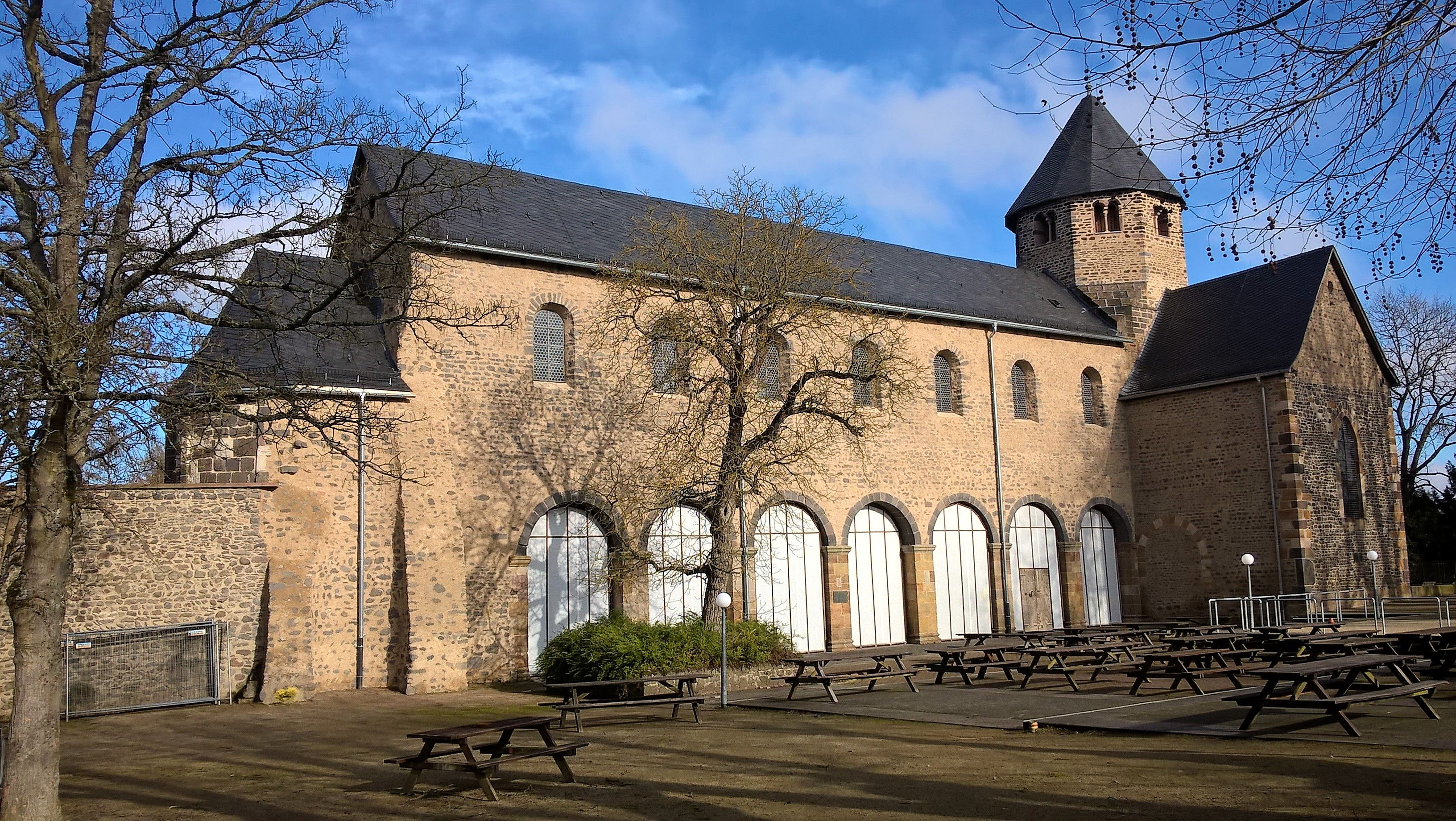 Kloster Schiffenberg, Landkreis Gießen, Hessen, Deutschland